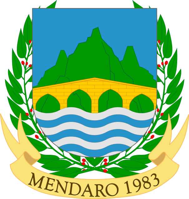 Mendaro, Gipuzkoako herriaren armarria